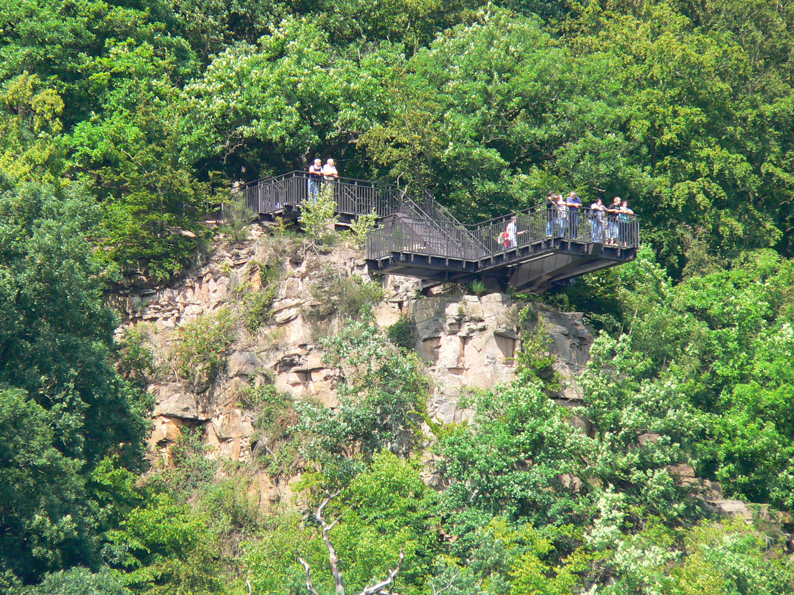 Der 2011 auf der zweiten Hannoverschen Klippe montierte "Weser-Skywalk" oberhalb der Weser bei Bad Karlshafen vom gegenüberliegenden Weserufer aus gesehen.